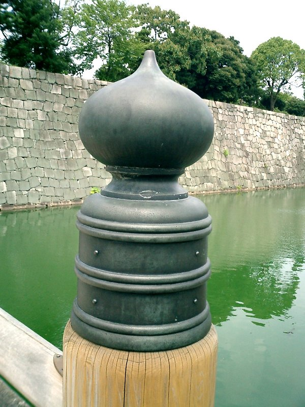 Giboshi_Nijo_Castle